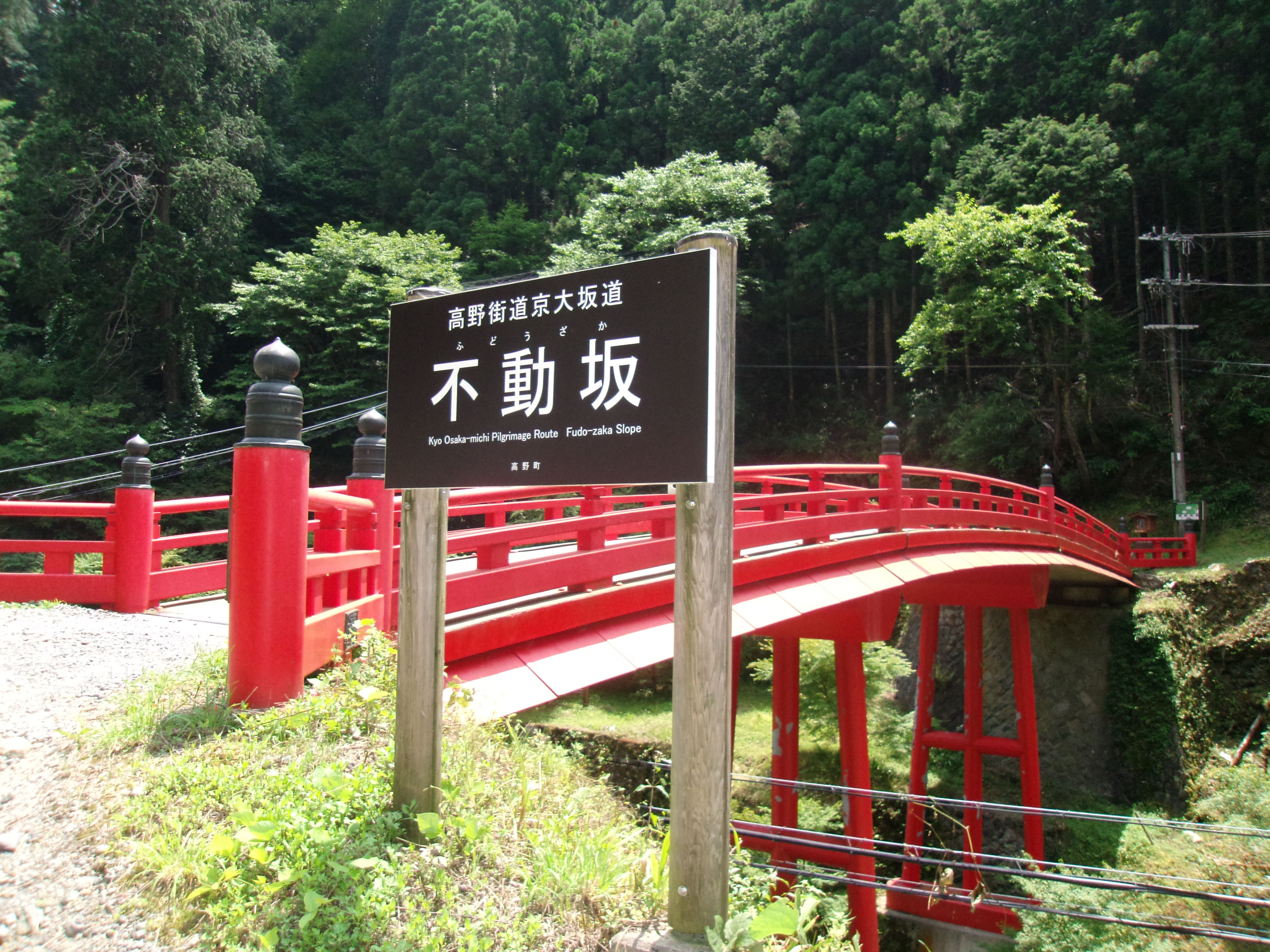 2016年に世界遺産「紀伊山地の霊場と参詣道」に「高野参詣道」として追加登録された京大坂道（きょうおおさかみち）の極楽橋、世界遺産登録を機に塗り替えが行われた